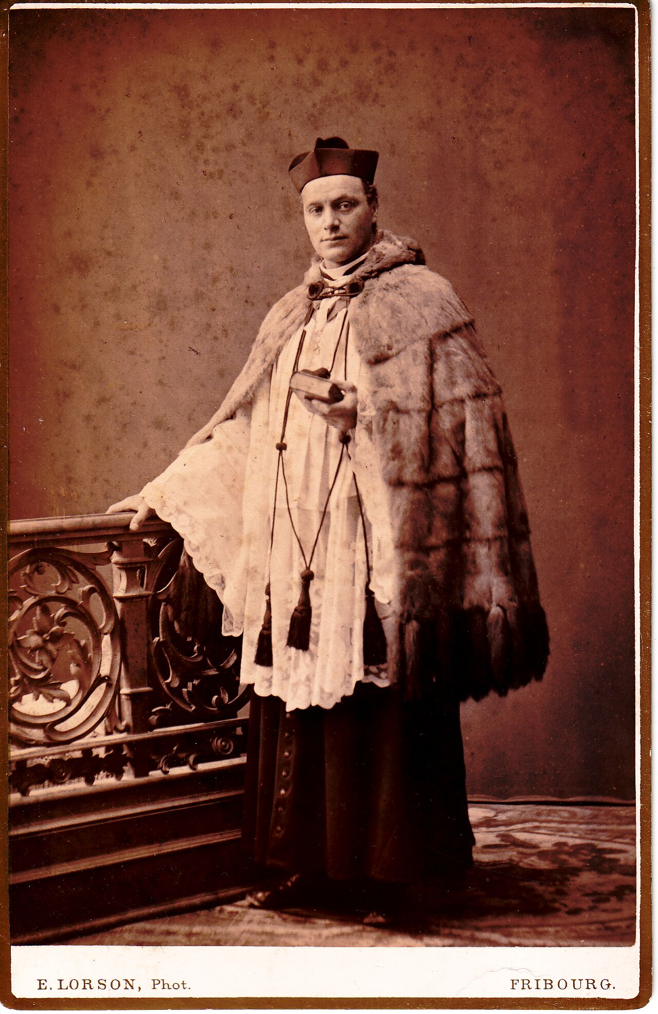 Geistlicher mit einer Almucia (Almutia), einem Umhang aus Fehrückenfellen mit Fehschweifen; Fribourg, Suisse; um 1900.